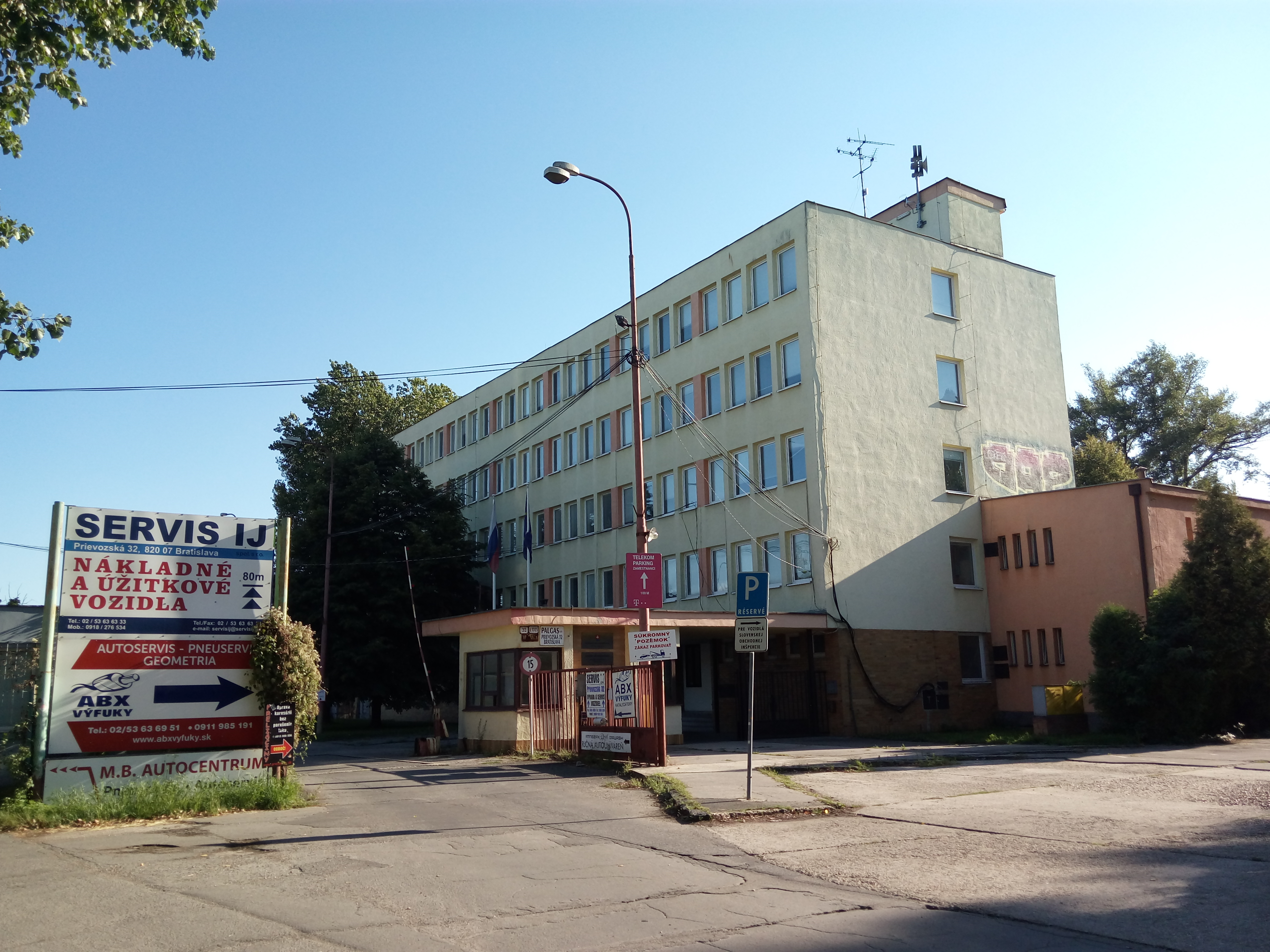 Prievozská 32, Ružinov, Bratislava